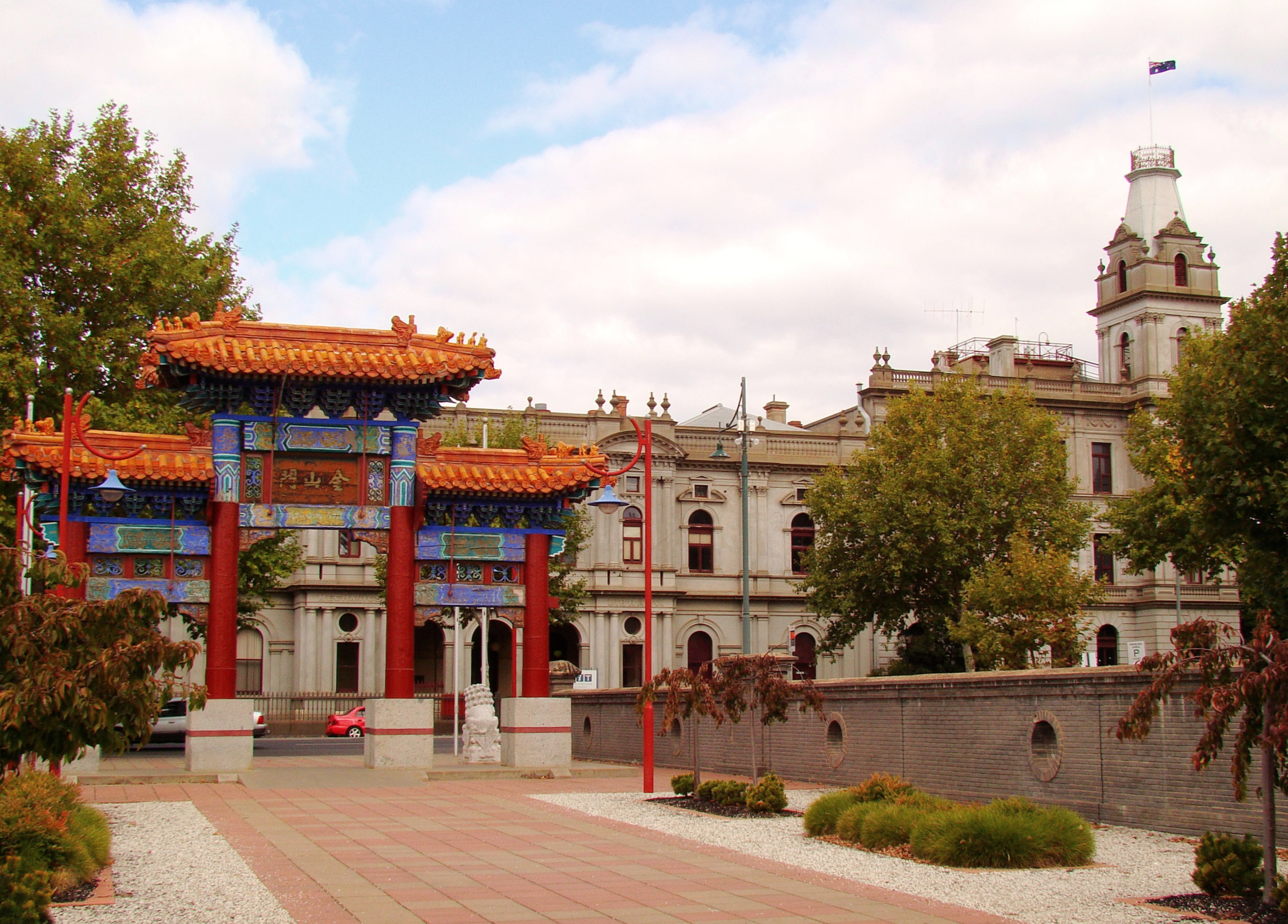 Bendigo Chinese Museum